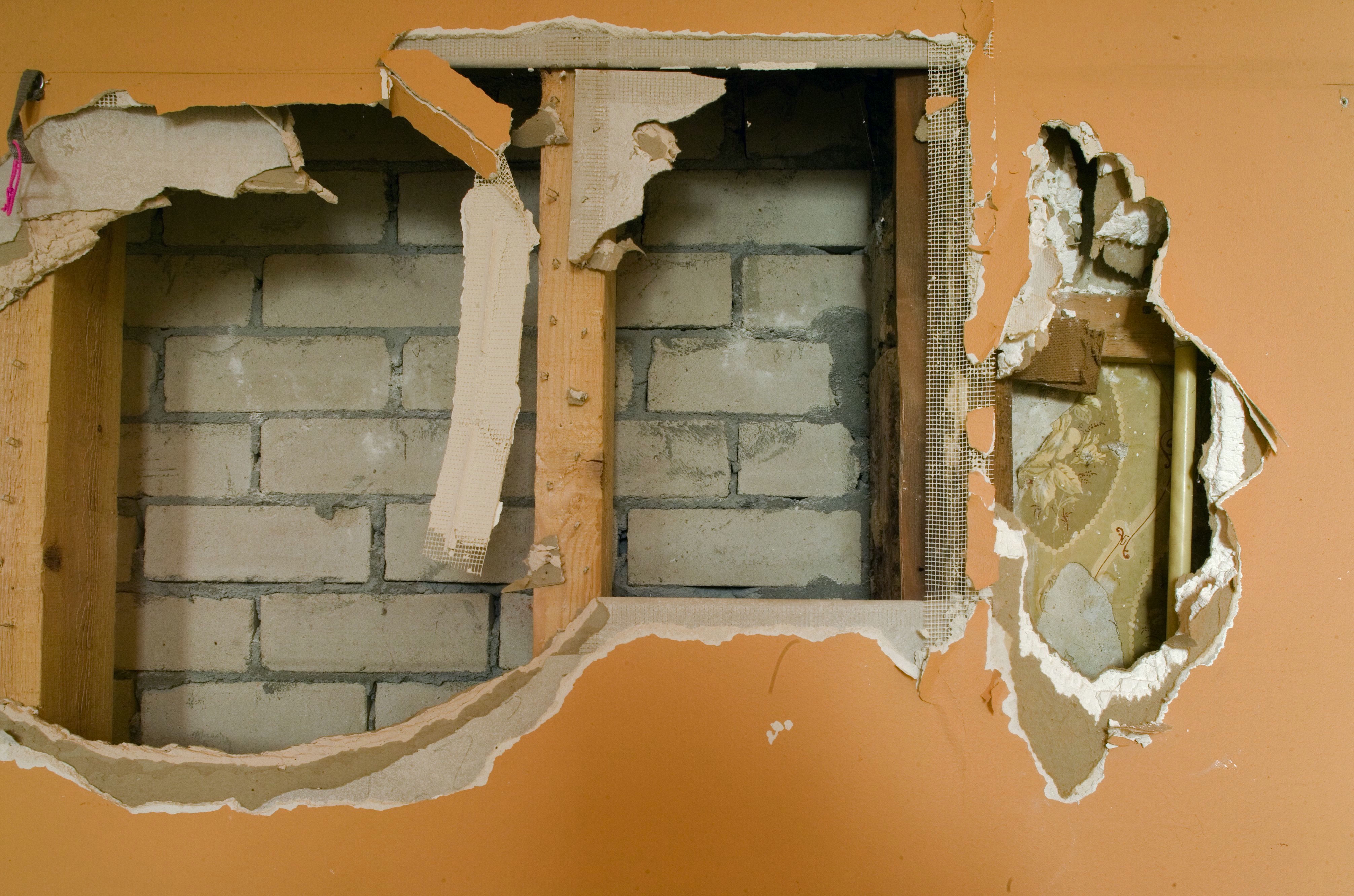 Huis Nederhoff: Interieur, begane grond, rechter achterkamer, detail: gat in de houten voorzetwand met zicht op de muur daarachter